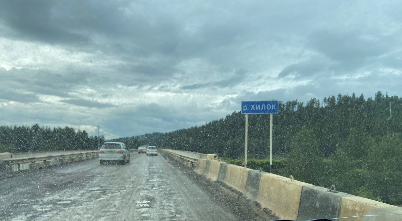 Bridge over the Khilok river